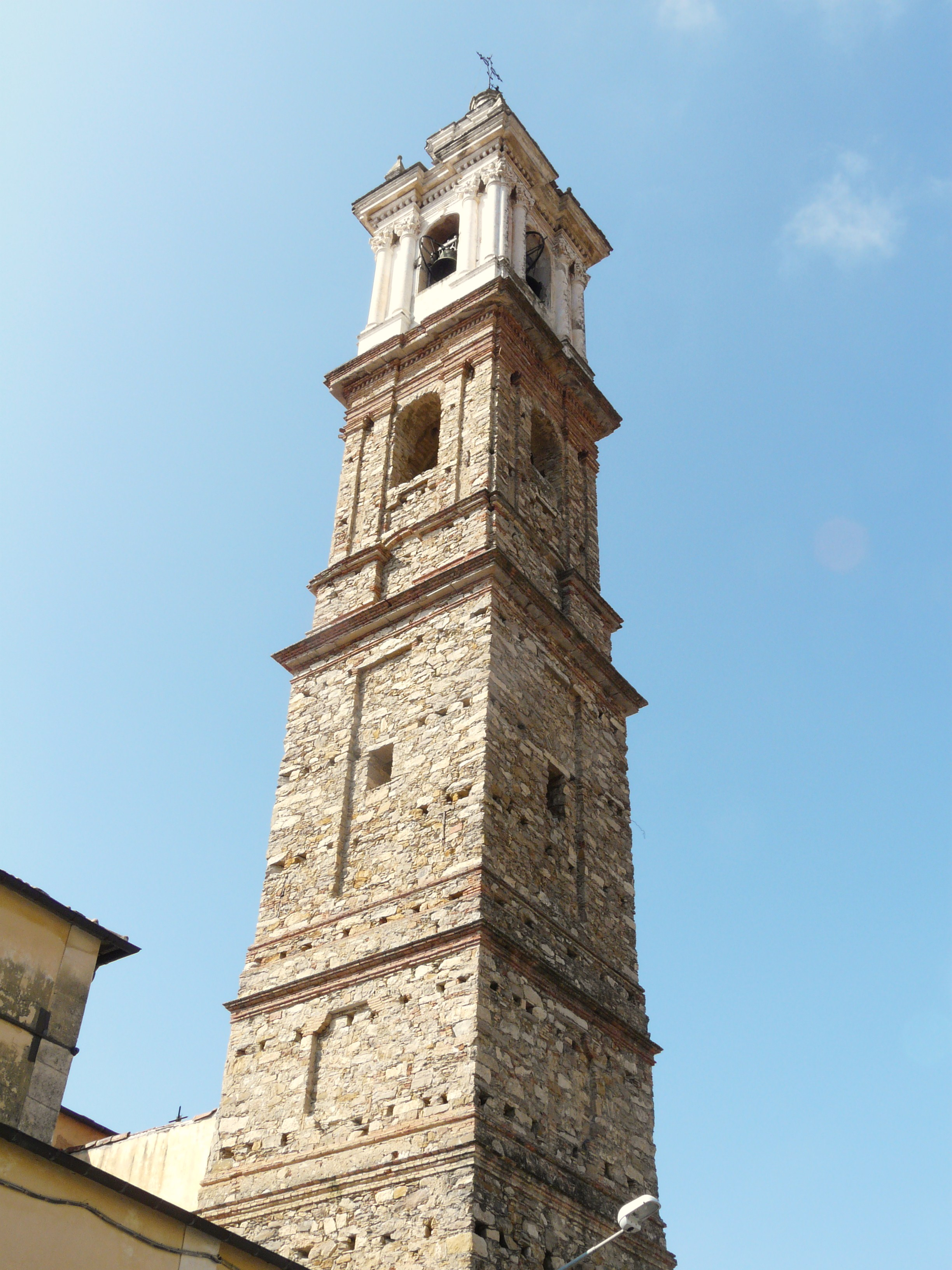 Chiesa di Sant'Antonio, Vasia, Liguria, Italia